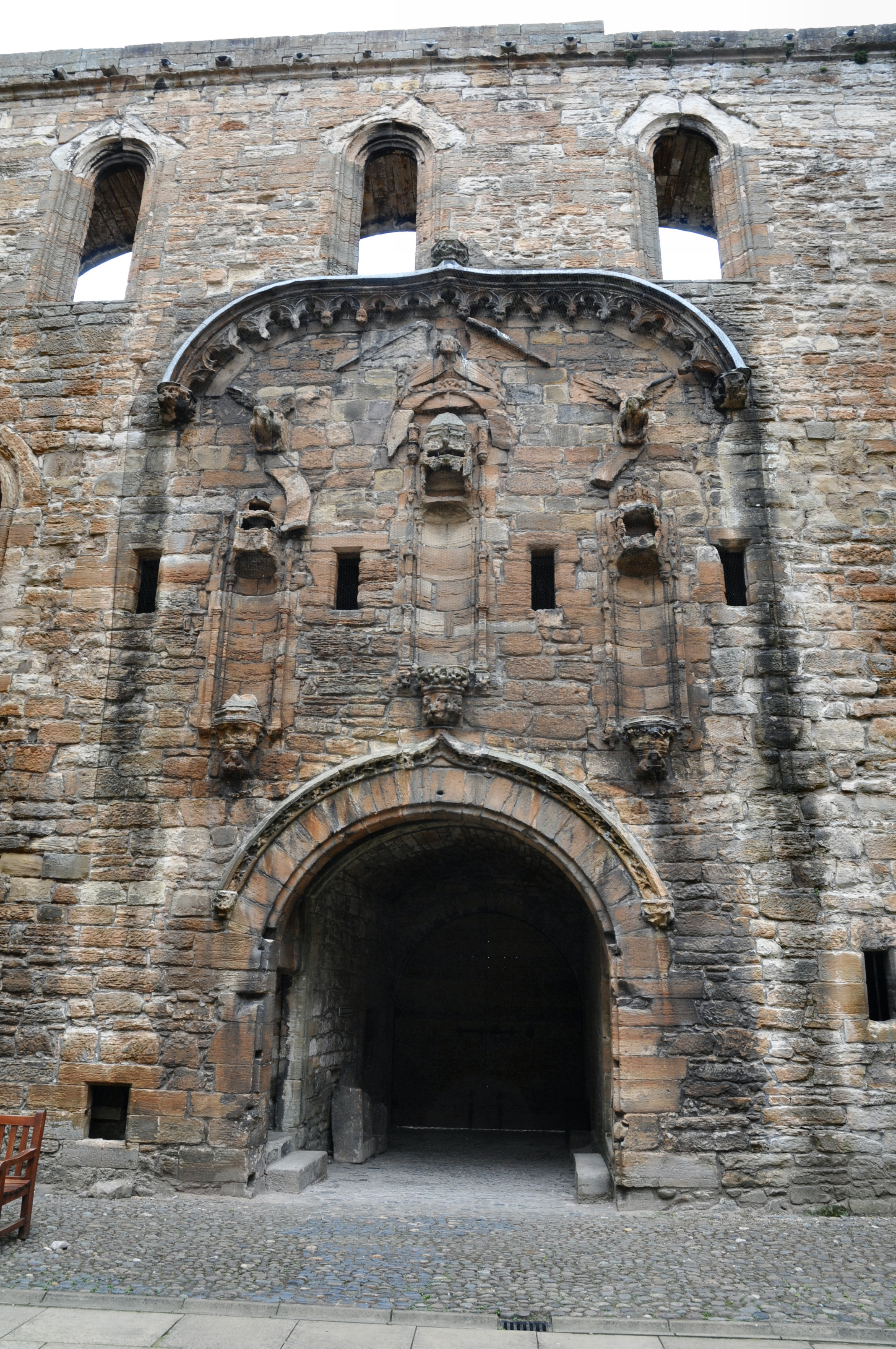 Hofseitige Ansicht des Ostportals von Linlithgow Palace